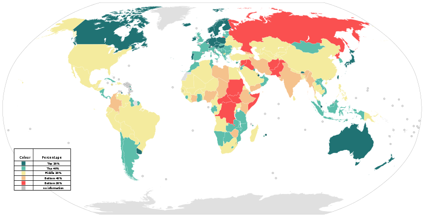 aggiornamento